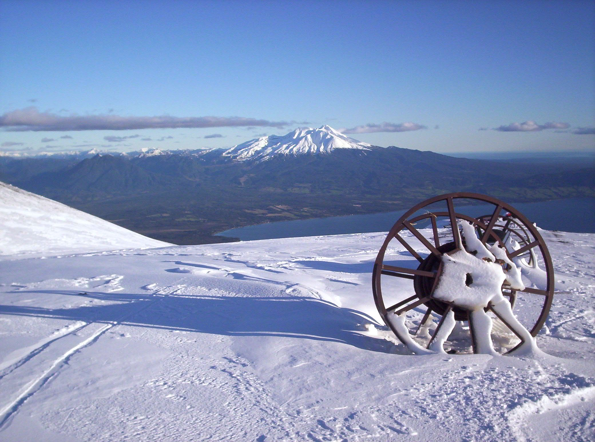 Foto tomada desde el volcán Osorno. Al fondo, el volcán Calbuco.